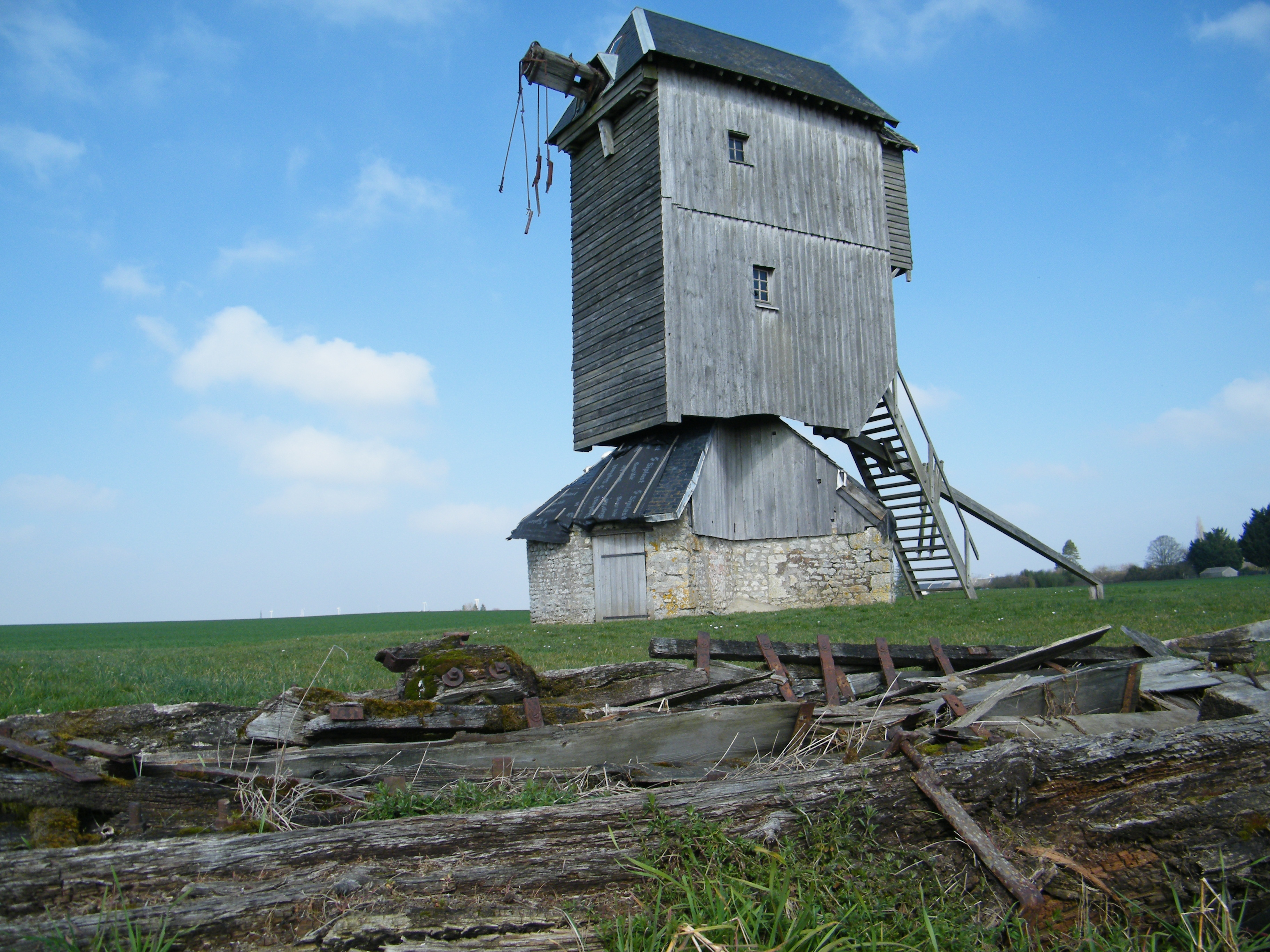 Moulin à vent de Lignerolles